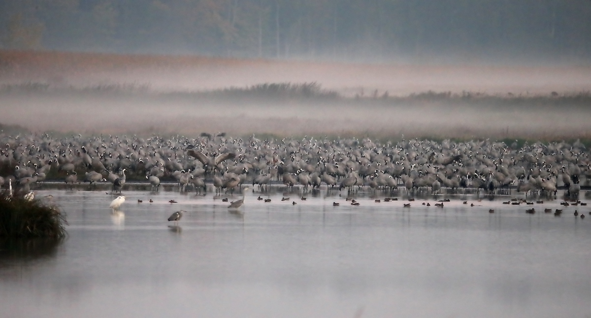 Schlafplatz von Kranichen und Silberreihern in Mecklenburg